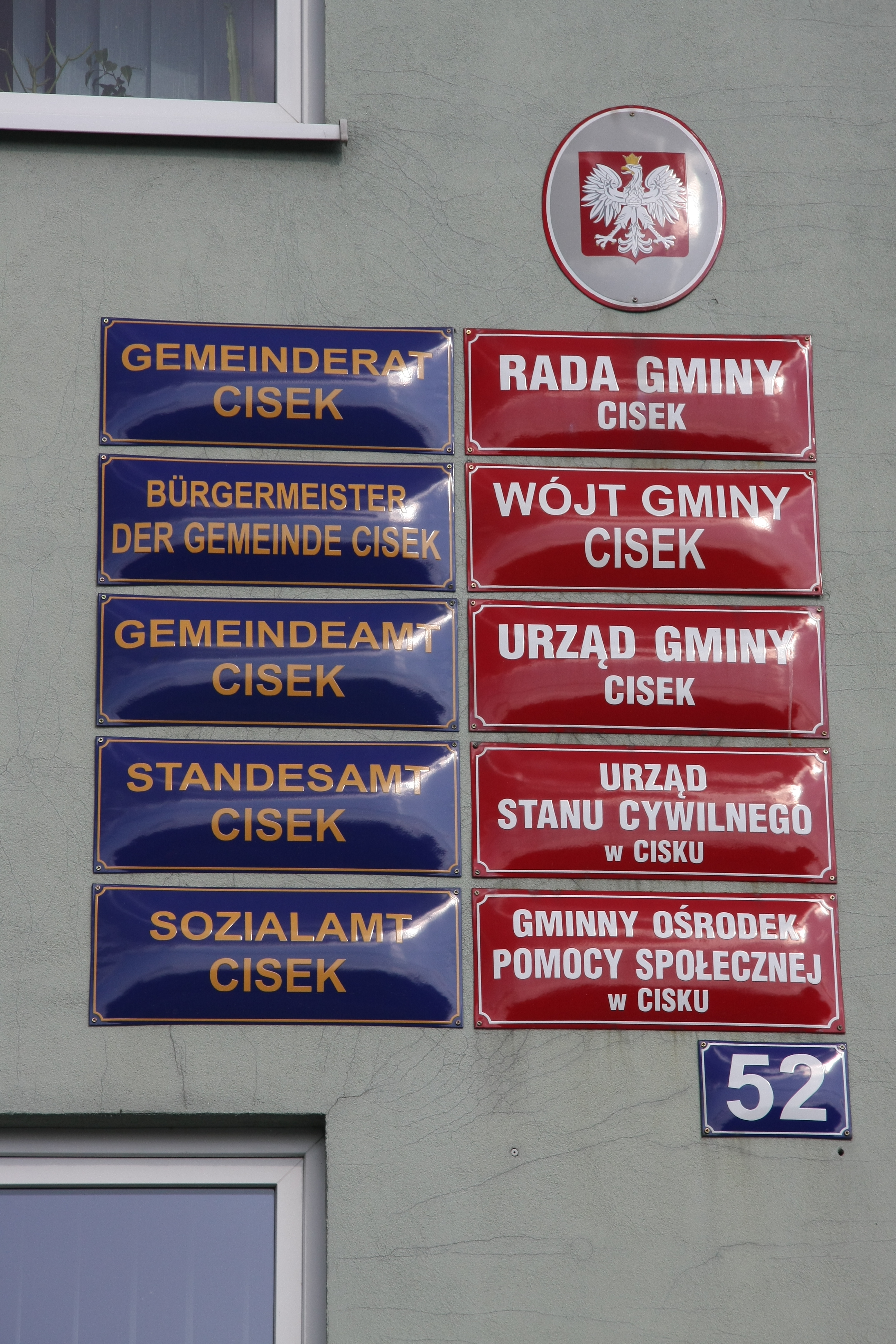 Dwujęzyczne tablice na urzędzie gminnym w miejscowości Cisek (gmina Cisek, powiat kędzierzyńsko-kozielski, województwo opolskie)